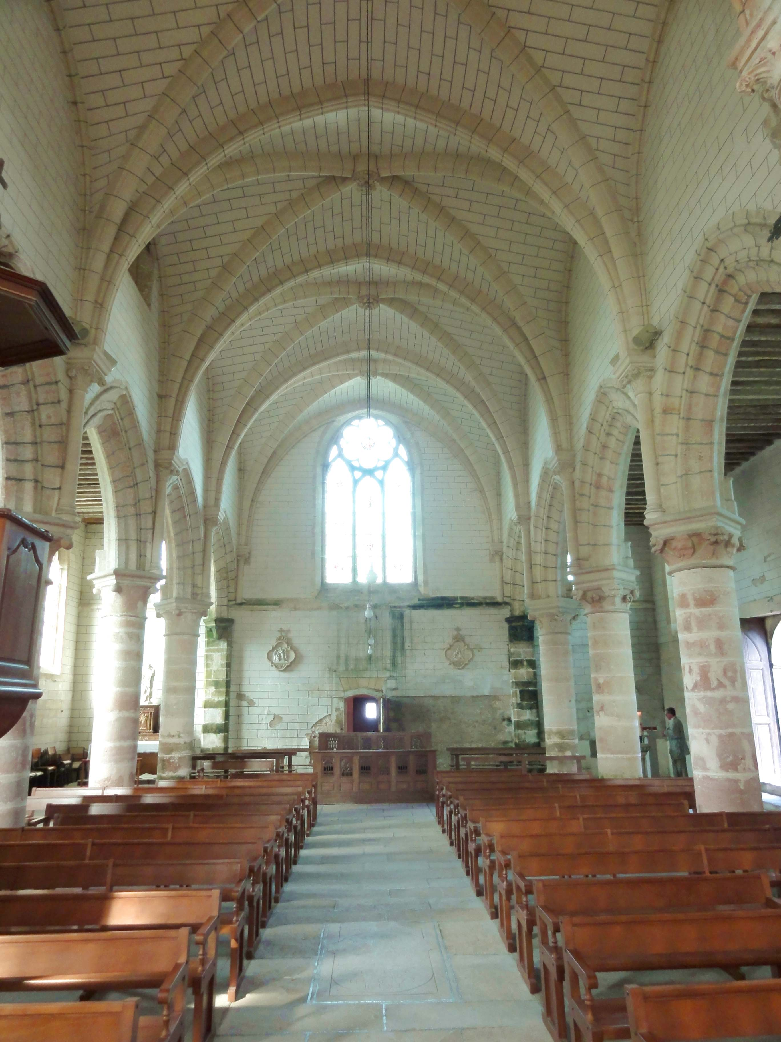 Intérieur de l'église - voir titre.